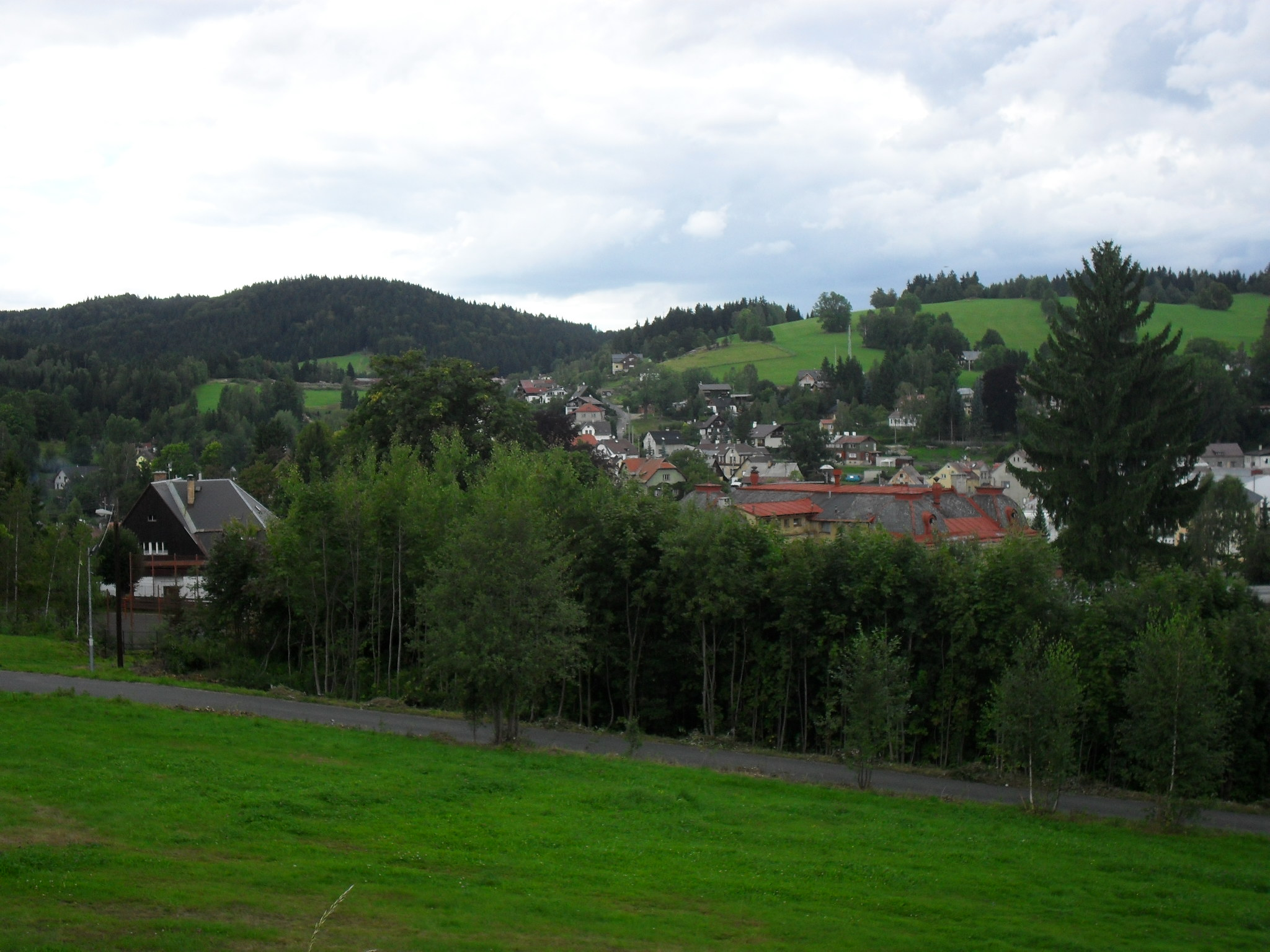 Pohled na Lučany nad Nisou od kostela